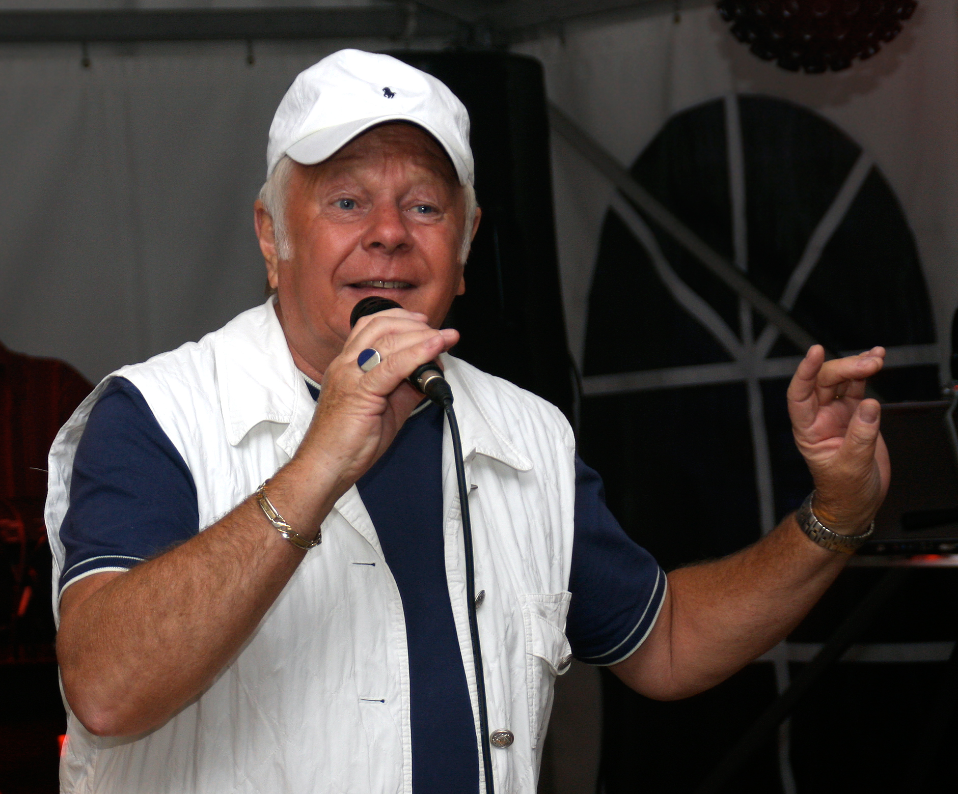 Graham Bonney, britischer Schlagersänger, bei einem Auftritt 2009